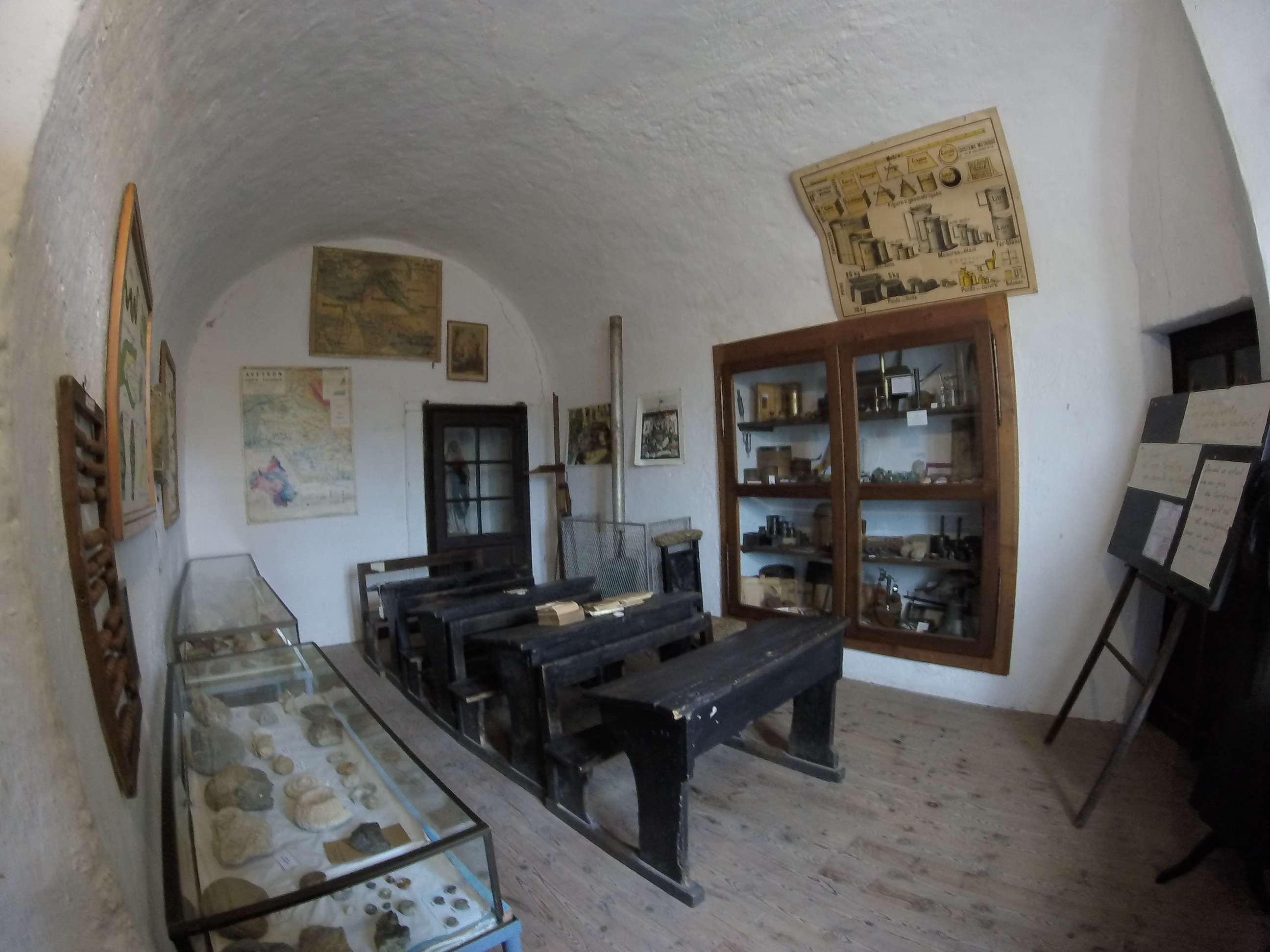 Salle de classe du début du siècle